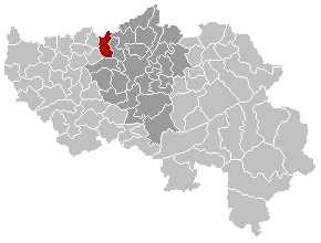 Gemeentekaart, eigen werk